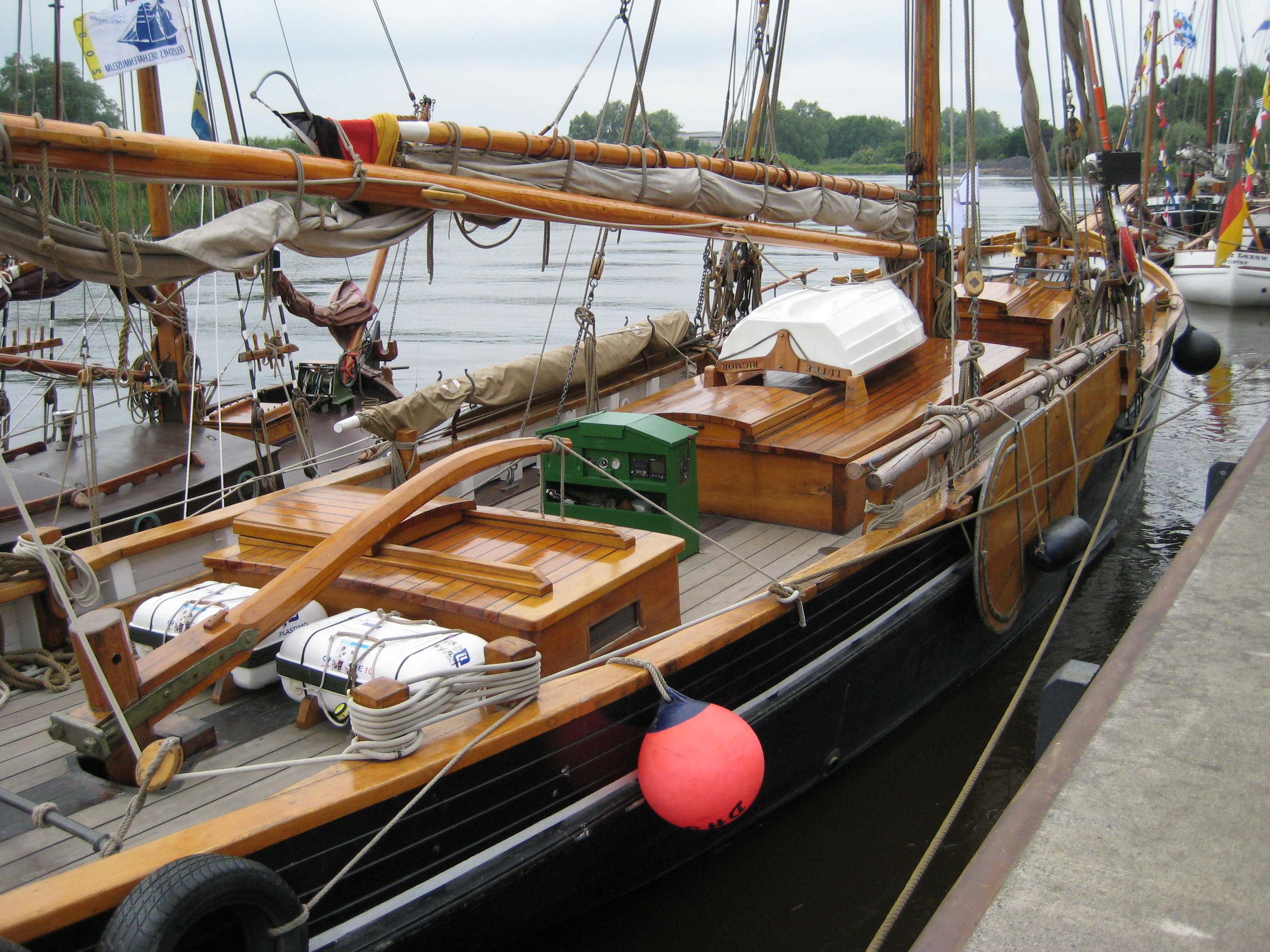 Das älteste fahrtüchtige Segelschiff Deutschlands, die Rigmor von Glueckstadt, Störschipperfest Itzehoe